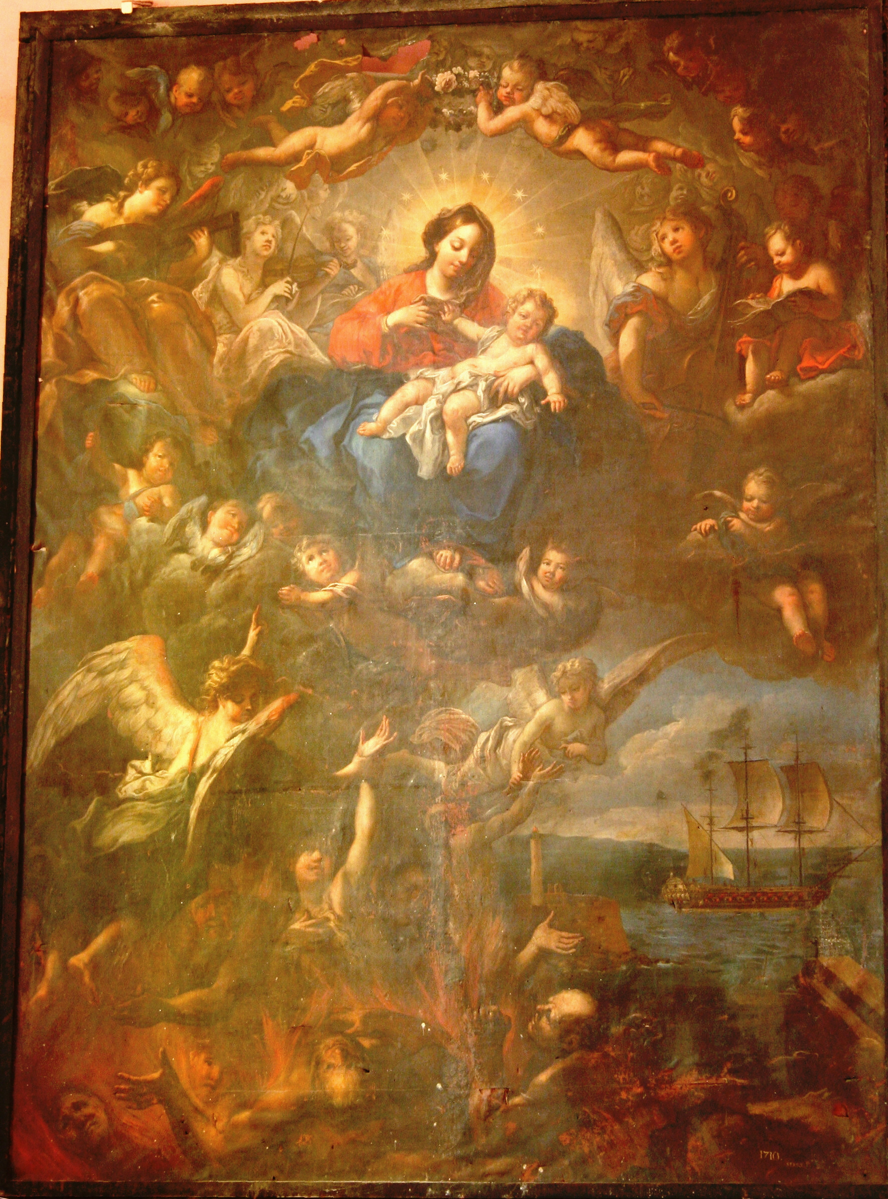 tableau de Michel Serre (1658-1733) se trouvant dans l'église Notre-Dame à La Ciotat (Bouches-du-Rhône), représentant la Vierge de grâces et le purgatoire.